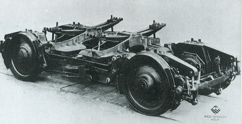 Jacobs-Drehgestell des SVT Kruckenberg auf einer Werksaufnahme von Westwaggon